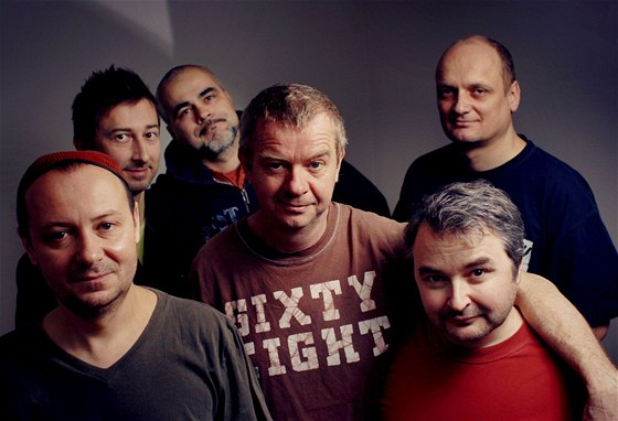 Skupina Mňága a Žďorp v současném složení